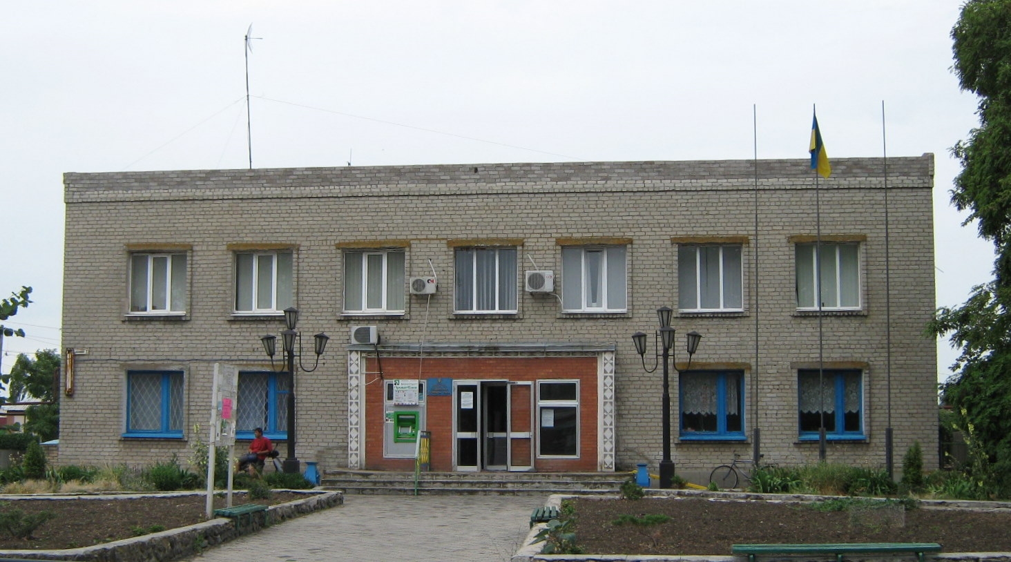 Сєдовська селищна рада